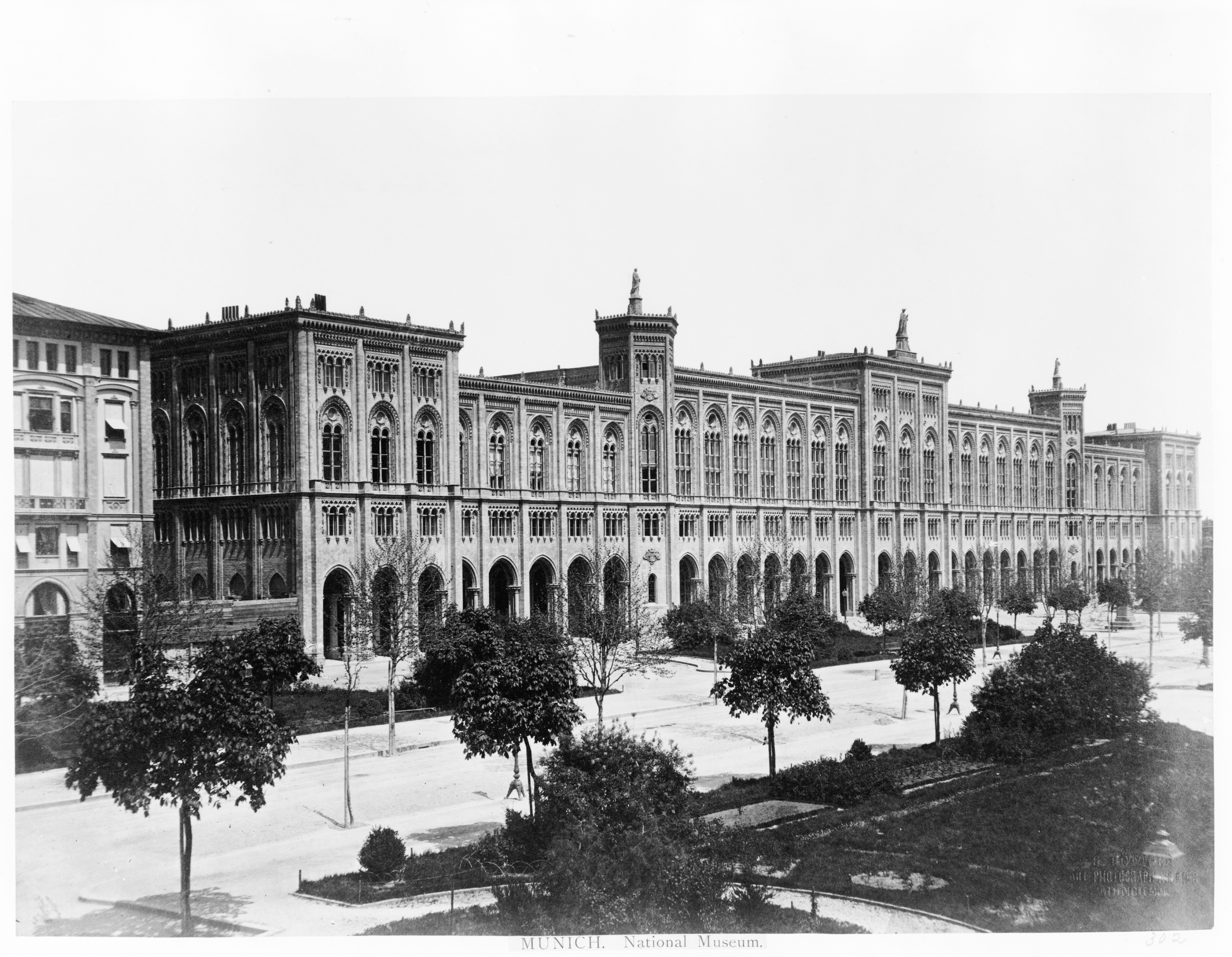 Photo - München - Regierung von Oberbayern - Aufnahme aus dem 19. Jhdt.